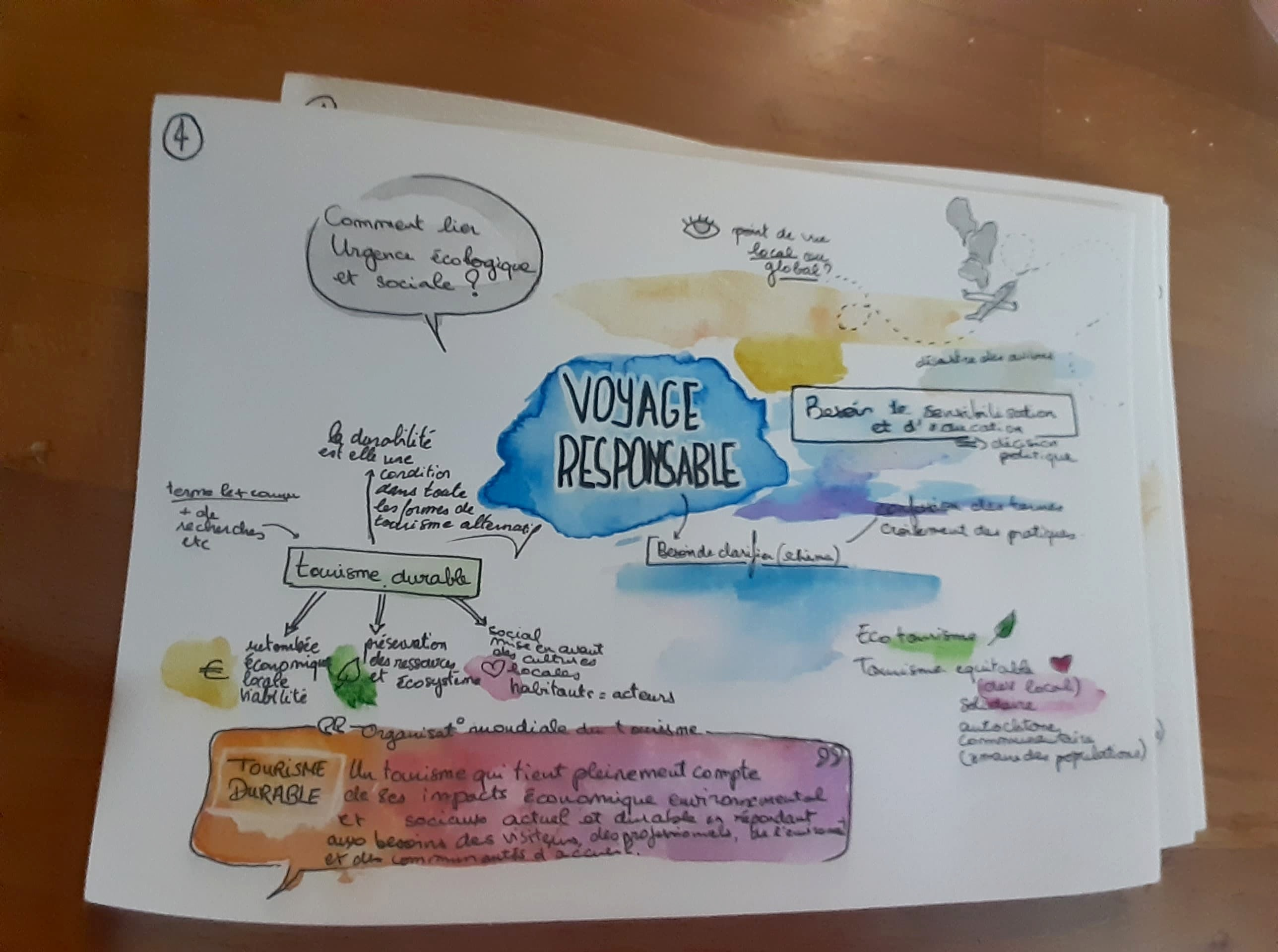 prise de note synthèse des échanges ateliers Didac'Ressources, Babel voyage, Eclore